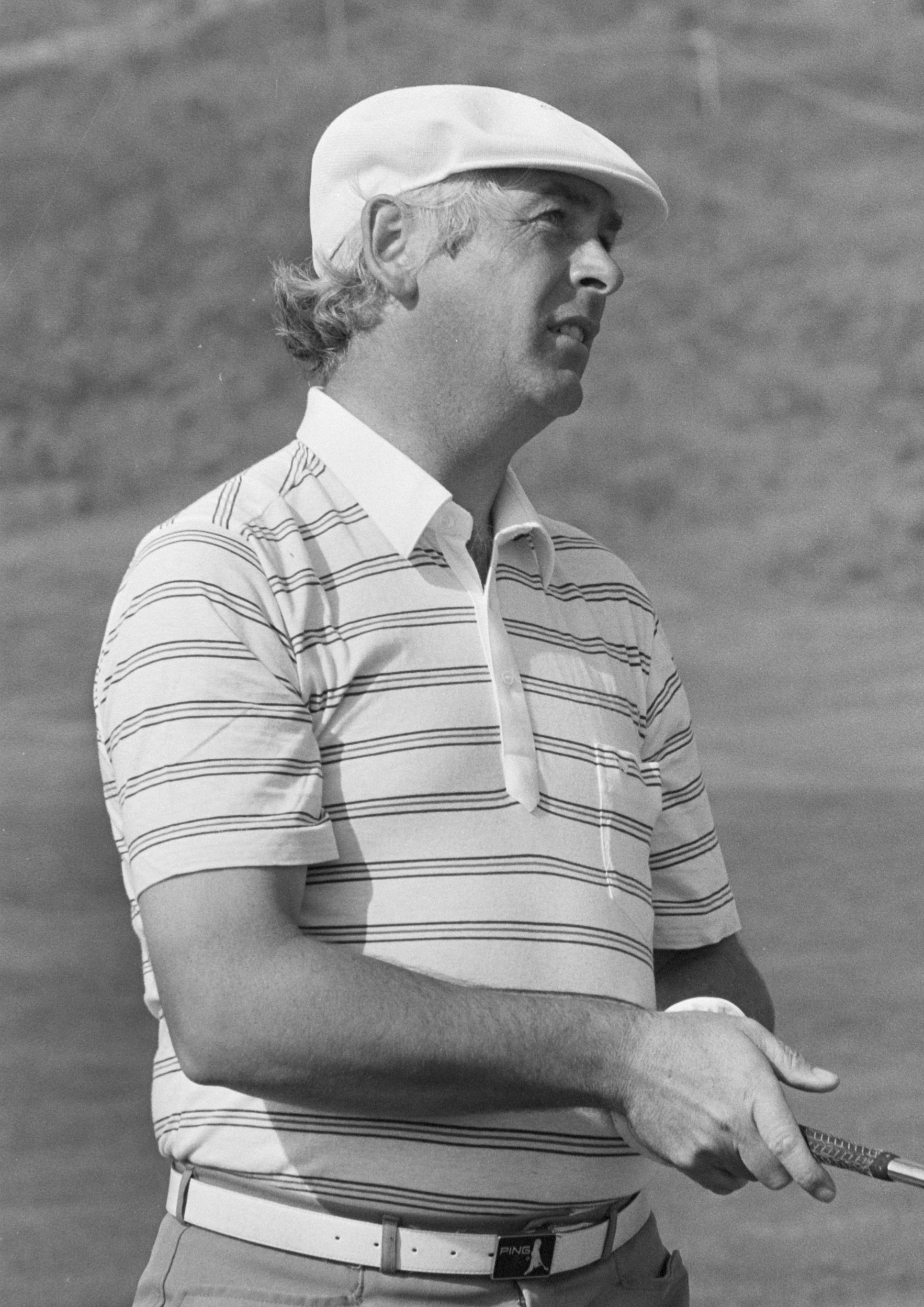 Internationaal golftoernooi in Noordwijk begint morgen; Christy O'Connor in actie